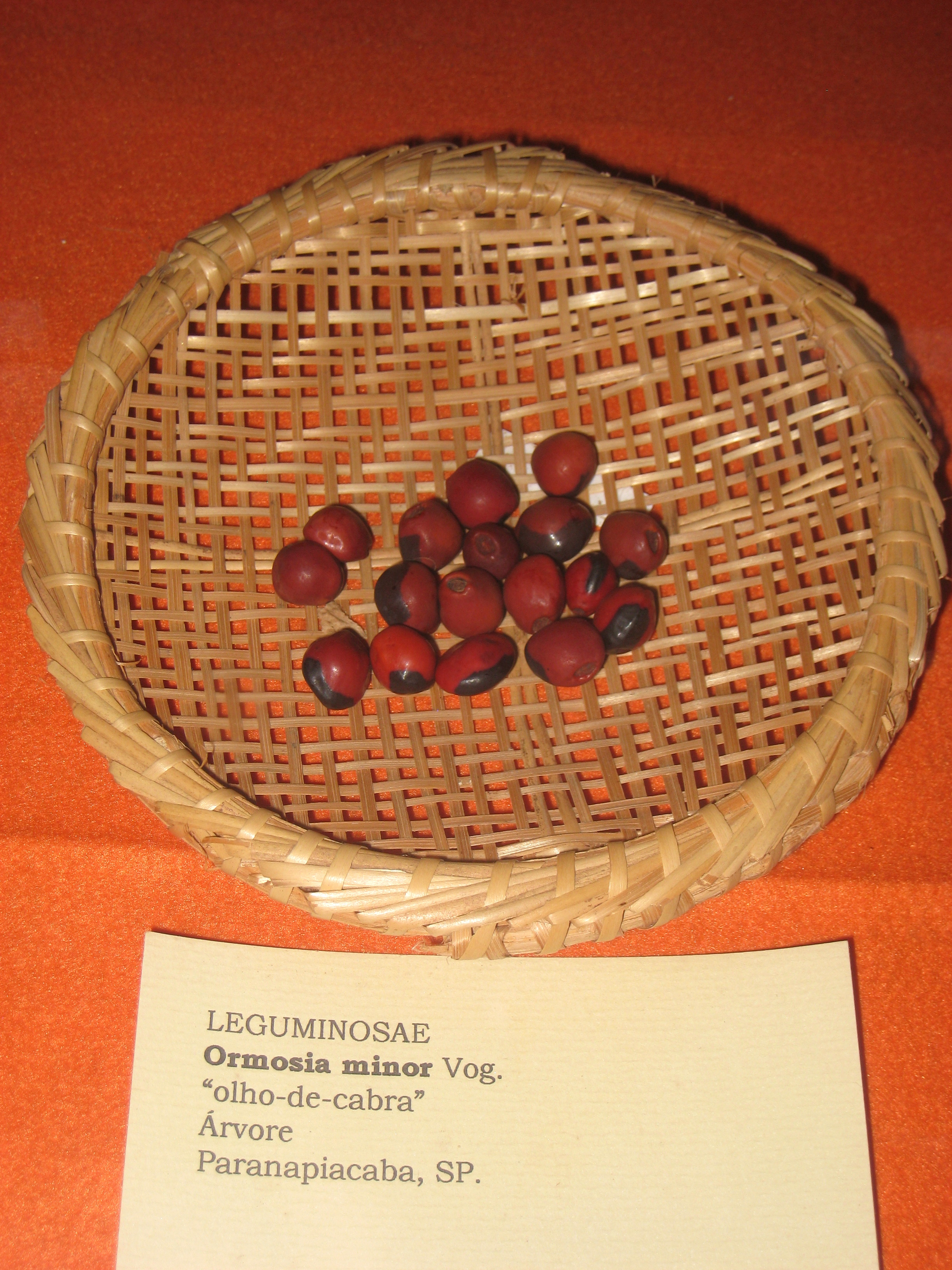 Ormosia minor specimen in the Museu Botânico Dr. João Barbosa Rodrigues, Jardim Botânico de São Paulo, São Paulo City, SP, Brazil.